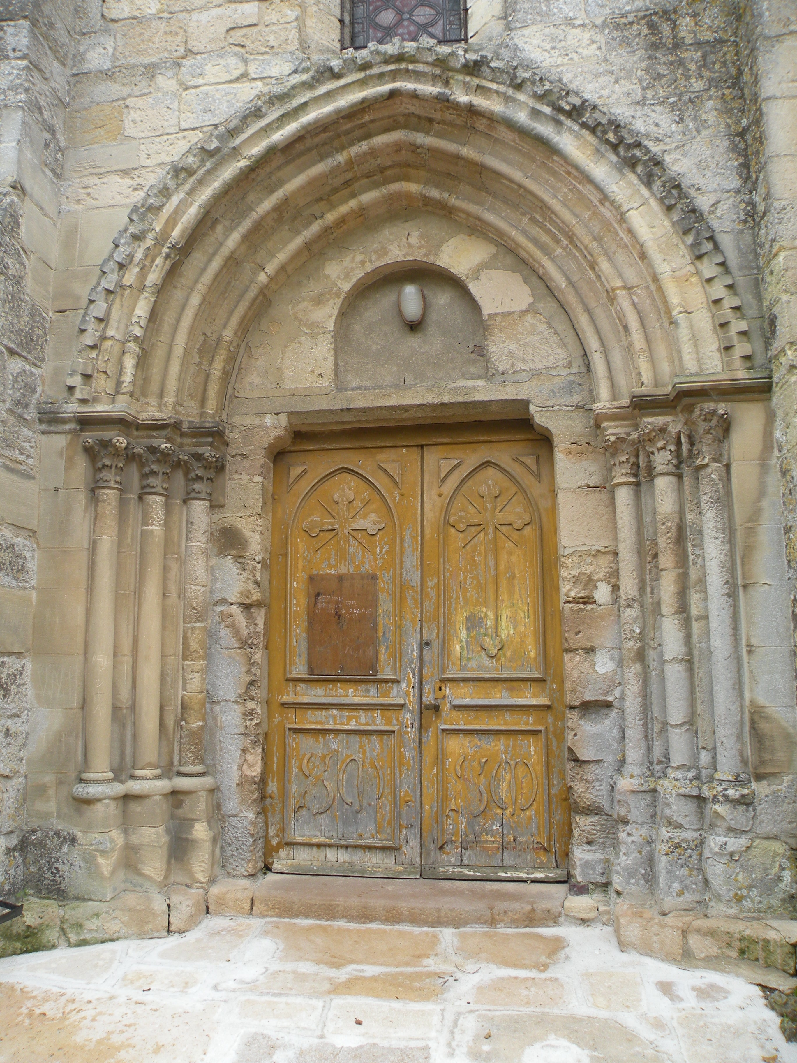 Église Saint-Martin de Vallangoujard